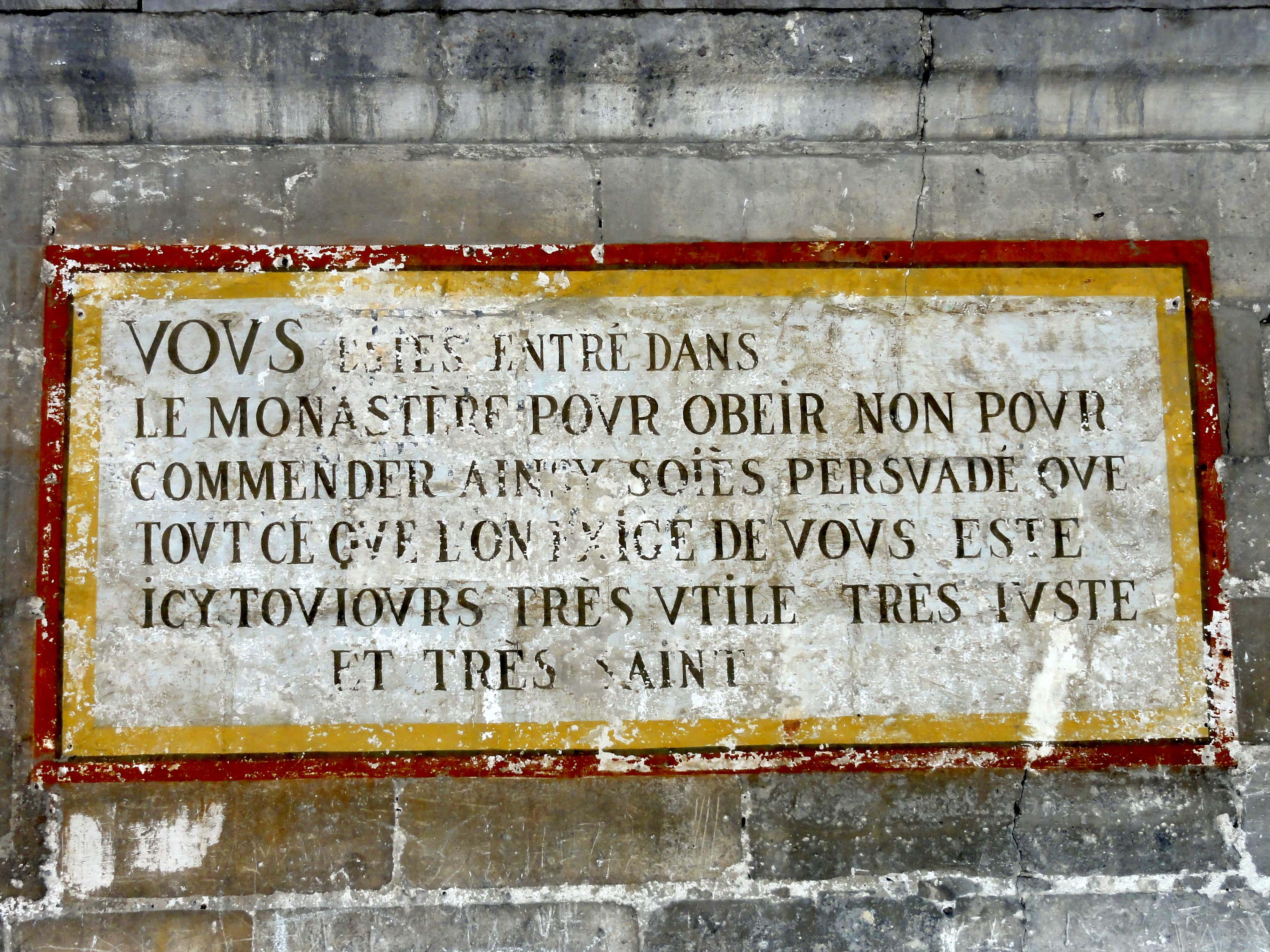 Abbaye du Moncel, extérieur - voir titre.